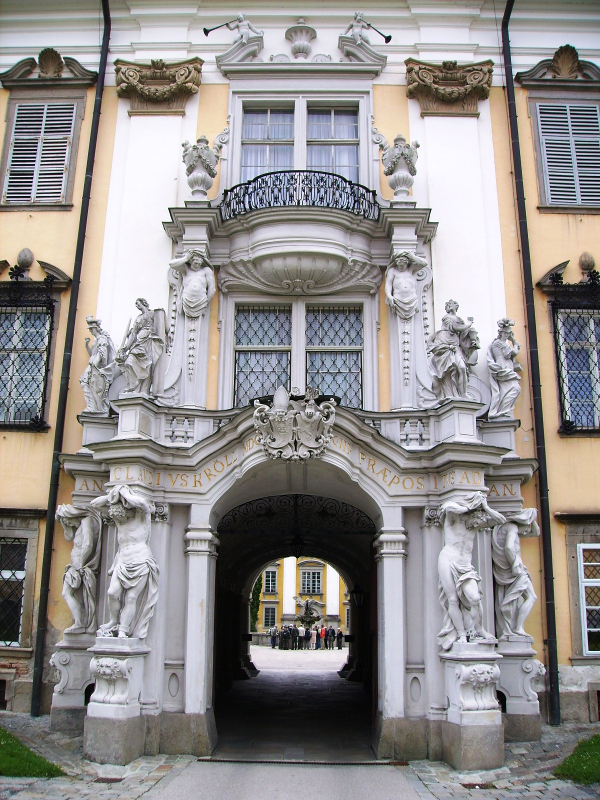 Stift Sankt Florian in der Nähe von Linz. Barockgebäude und Stiftsbasilika der Architekten Carlo Antonio Carlone, Jakob Prandtauer und Gotthard Hayberger, erbaut im Zeitraum von 1686 bis 1750.